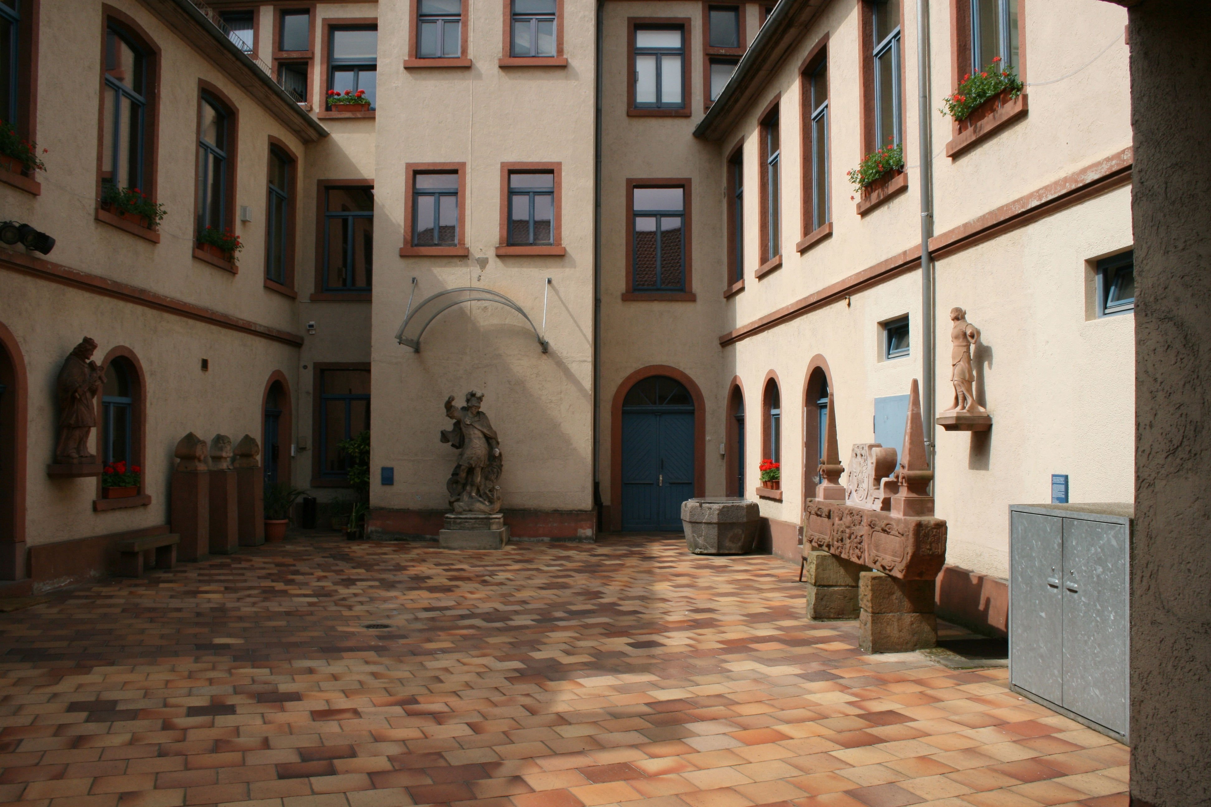 Innenhof des Wetterau-Museums mit Steindenkmälern.